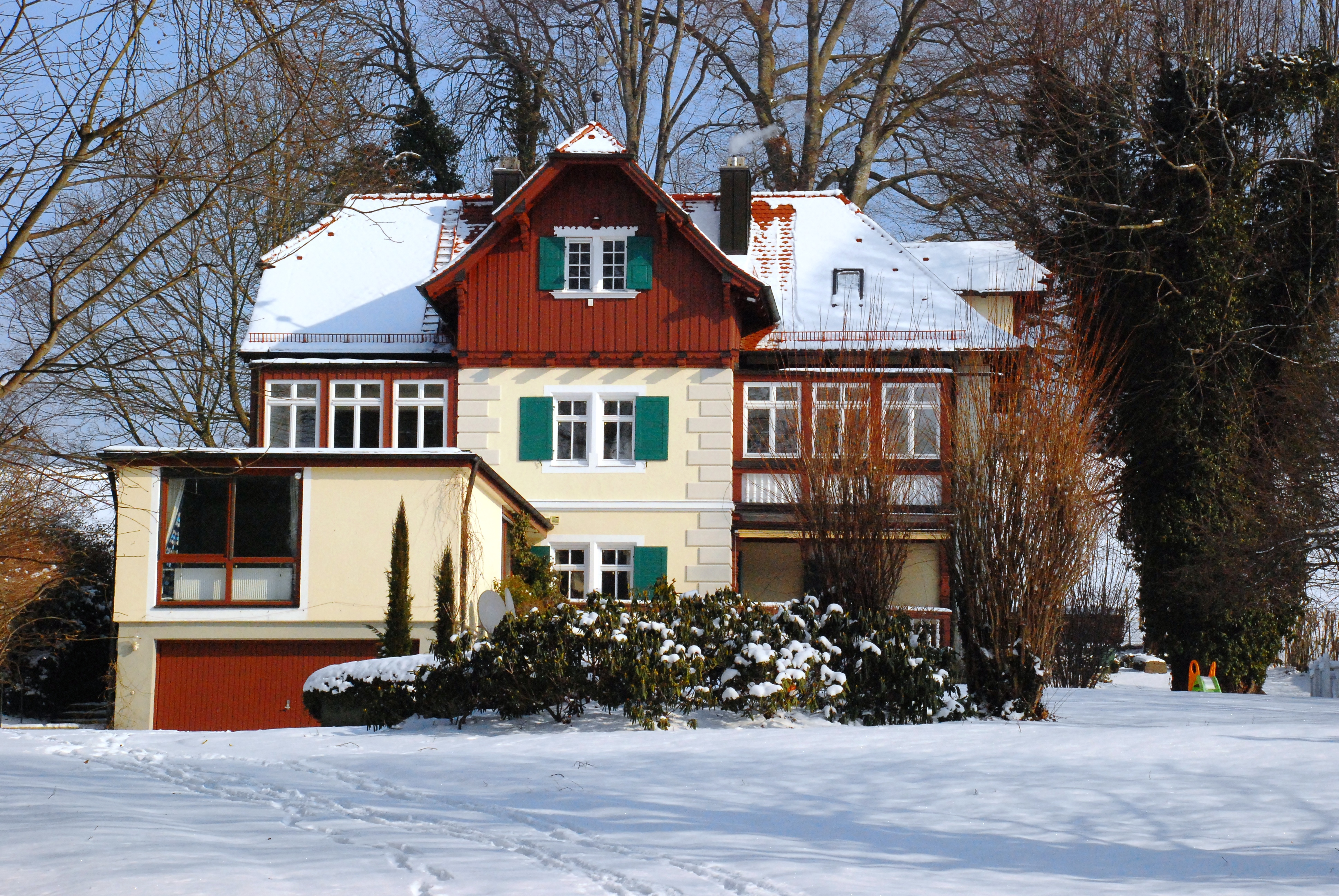 "Bonsels-Haus" an der Seeuferstraße 25 in Ambach, Gemeinde Münsing, Landkreis Bad Tölz-Wolfratshausen, Regierungsbezirk Oberbayern, Bayern. Als Baudenkmal in der Bayerischen Denkmalliste aufgeführt. Laut Denkmalliste erbaut 1895 von Emanuel von Seidl. Laut Gebäudetafel erbaut für den Künstler Benzcur Gyula, ab 1919 im Besitz des Autors Waldemar Bonsels.